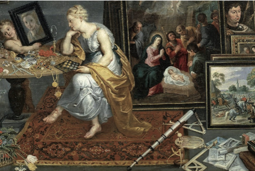 Fig. 8. Parte del quadro “La vista e l’olfatto” (ca. 1618) di vari autori, incluso Jan Bruegel, conservato al Prado. Il quadro è una copia antica di un originale andato perduto nel 1731, nell’incendio del palazzo di Coudemberg a Bruxelles.